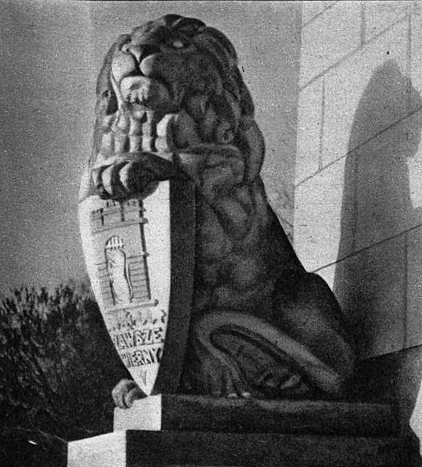 Cmentarz Obrony Lwowa lew zawsze wierny (-1939(